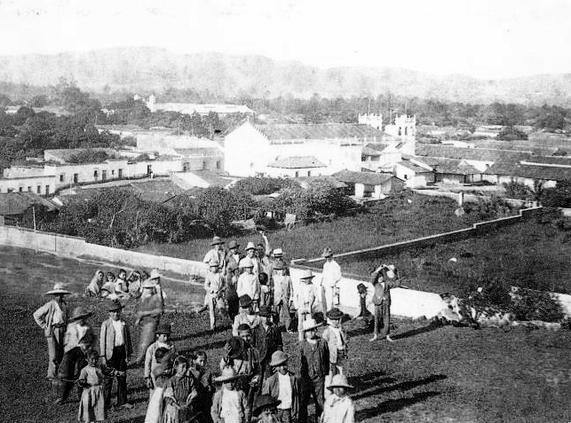 Iglesia de La Candelaria vista desde el Cerrito del Carmen en 1875.